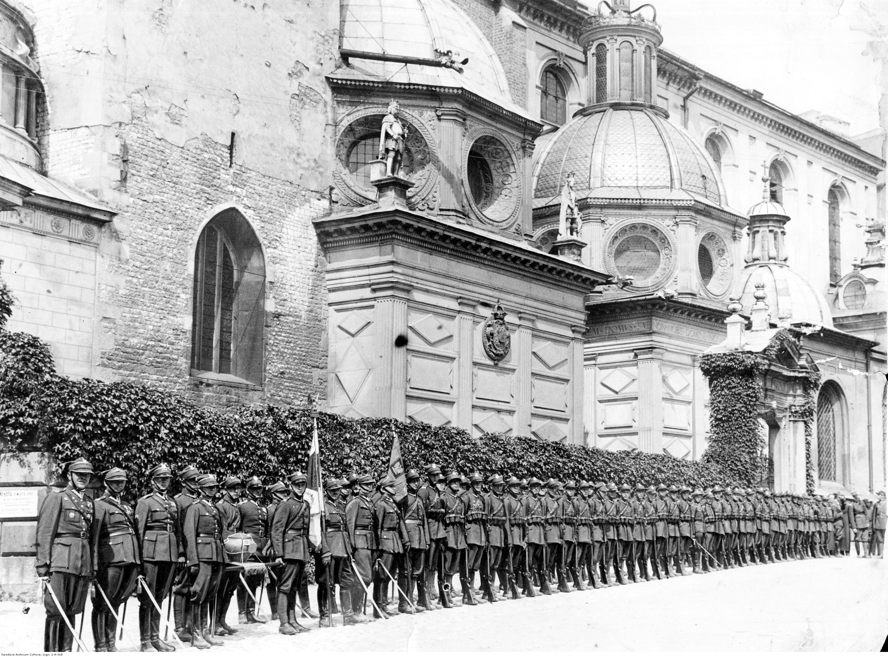 Uczczenie pamięci marszałka Polski Józefa Piłsudskiego w Krakowie. 76 Lidzki Pułk Piechoty im. Ludwika Narbutta z Grodna przed katedrą na Wawelu z hołdem, w dniu swego święta pułkowego; sierpień 1939. Koncern Ilustrowany Kurier Codzienny - Archiwum Ilustracji. Sygnatura: 1-A-318